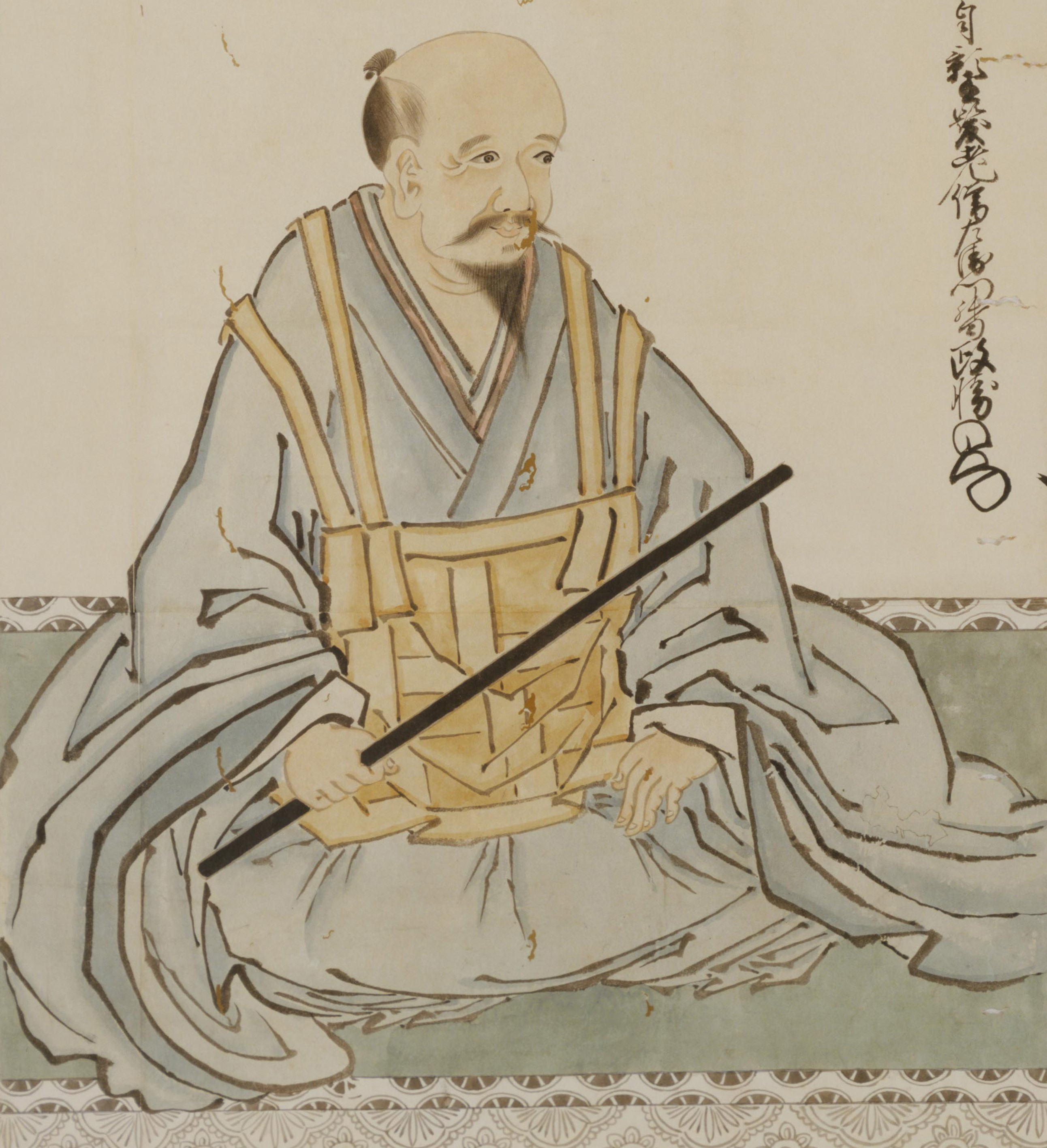 結城政勝の肖像。